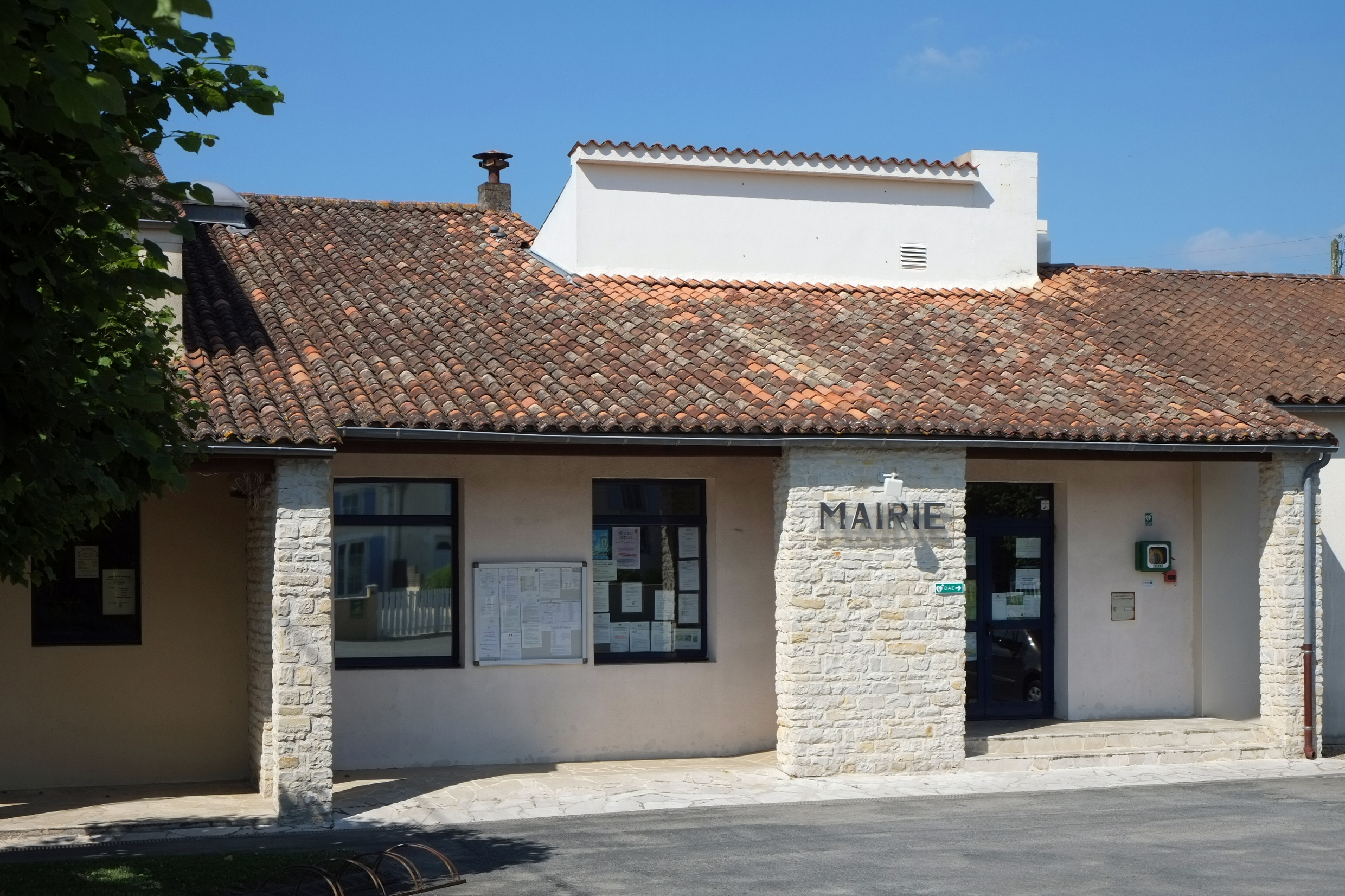 Mairie Cramchaban Charente-Maritime France